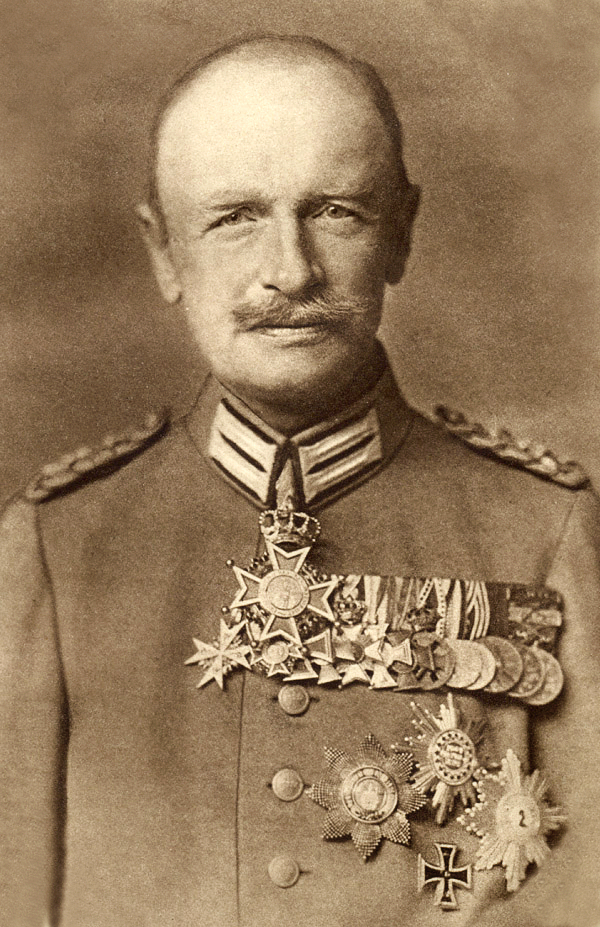 Friedrich_August_III_van_Saksen